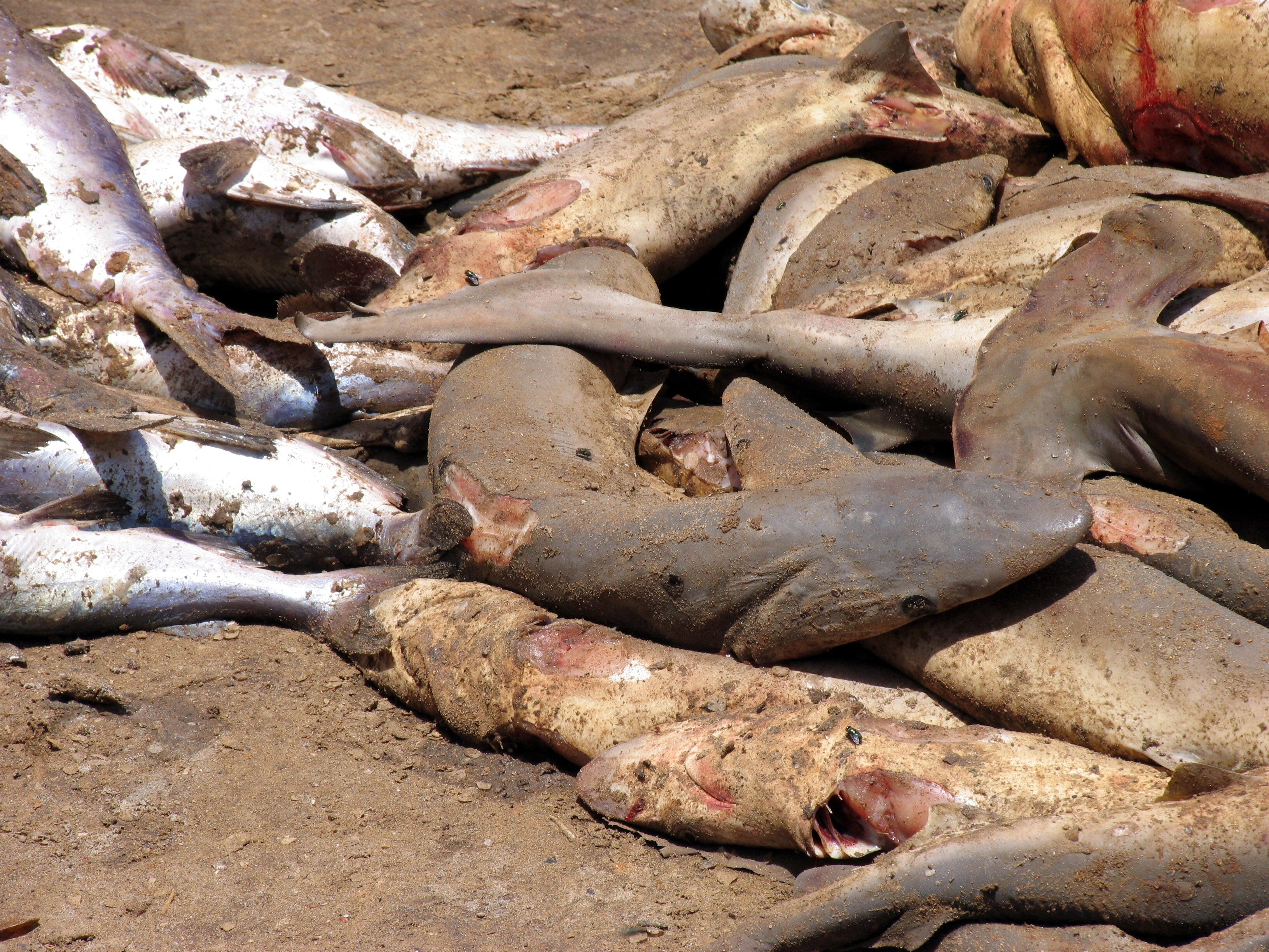 Mbour (Senegal)